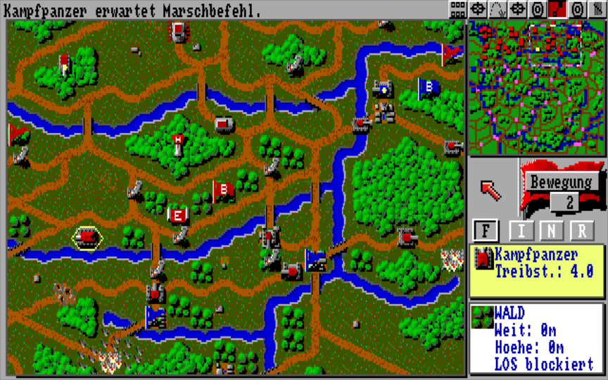 Spielfeldausschnitt der Karte Patton ärgert sich von Perfect General